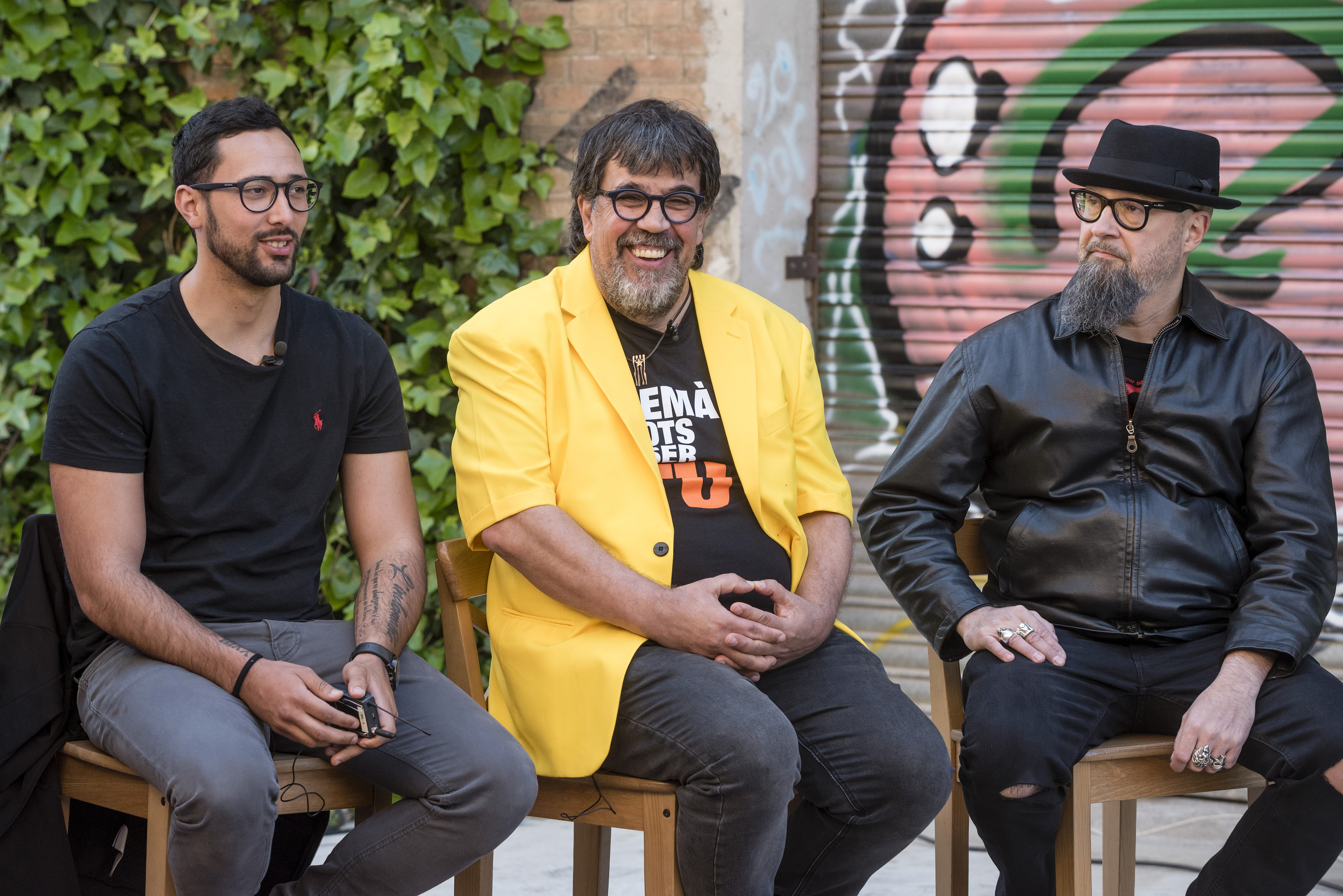 _DC71147